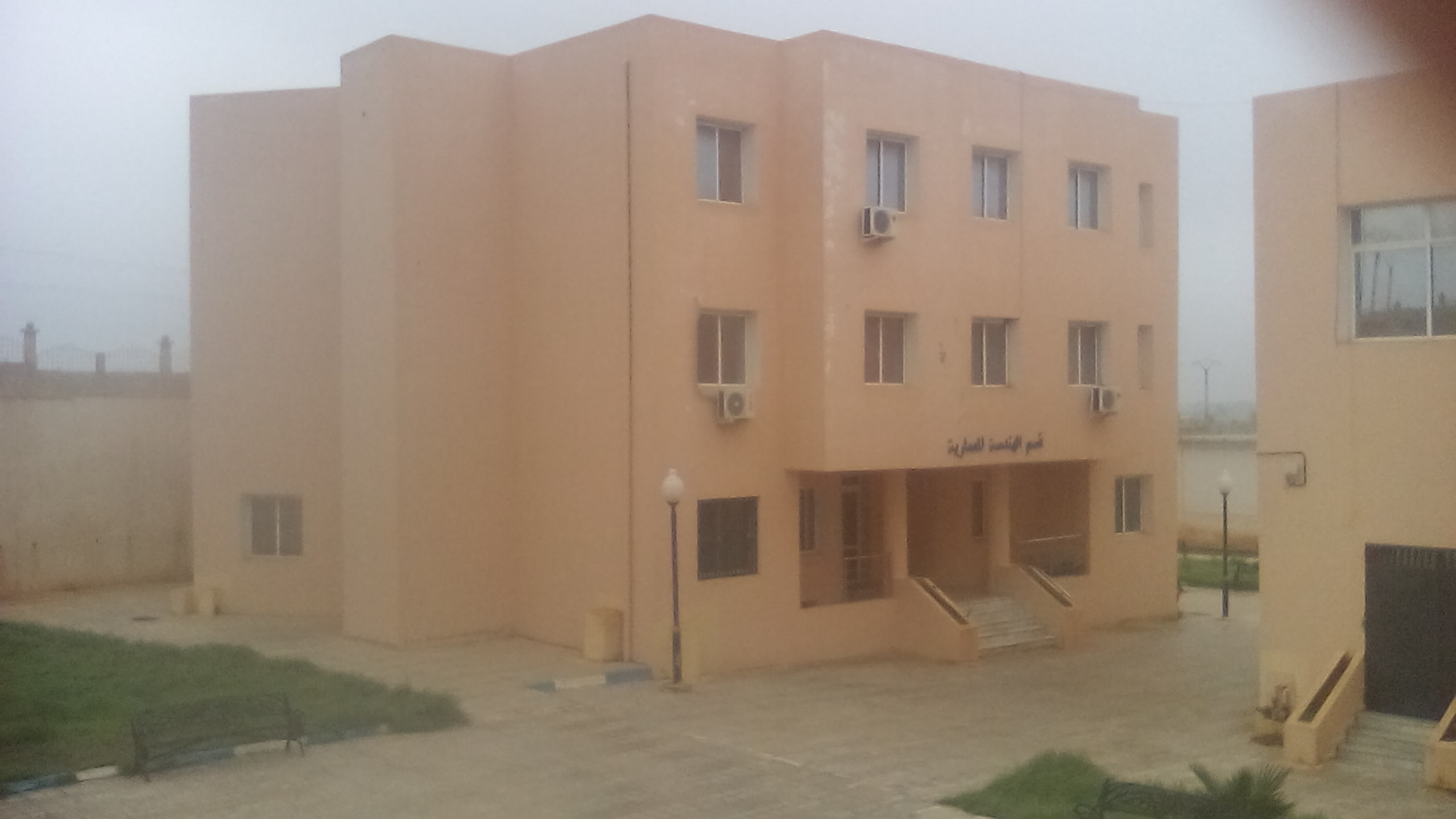 Infrastructure de la faculté fgca